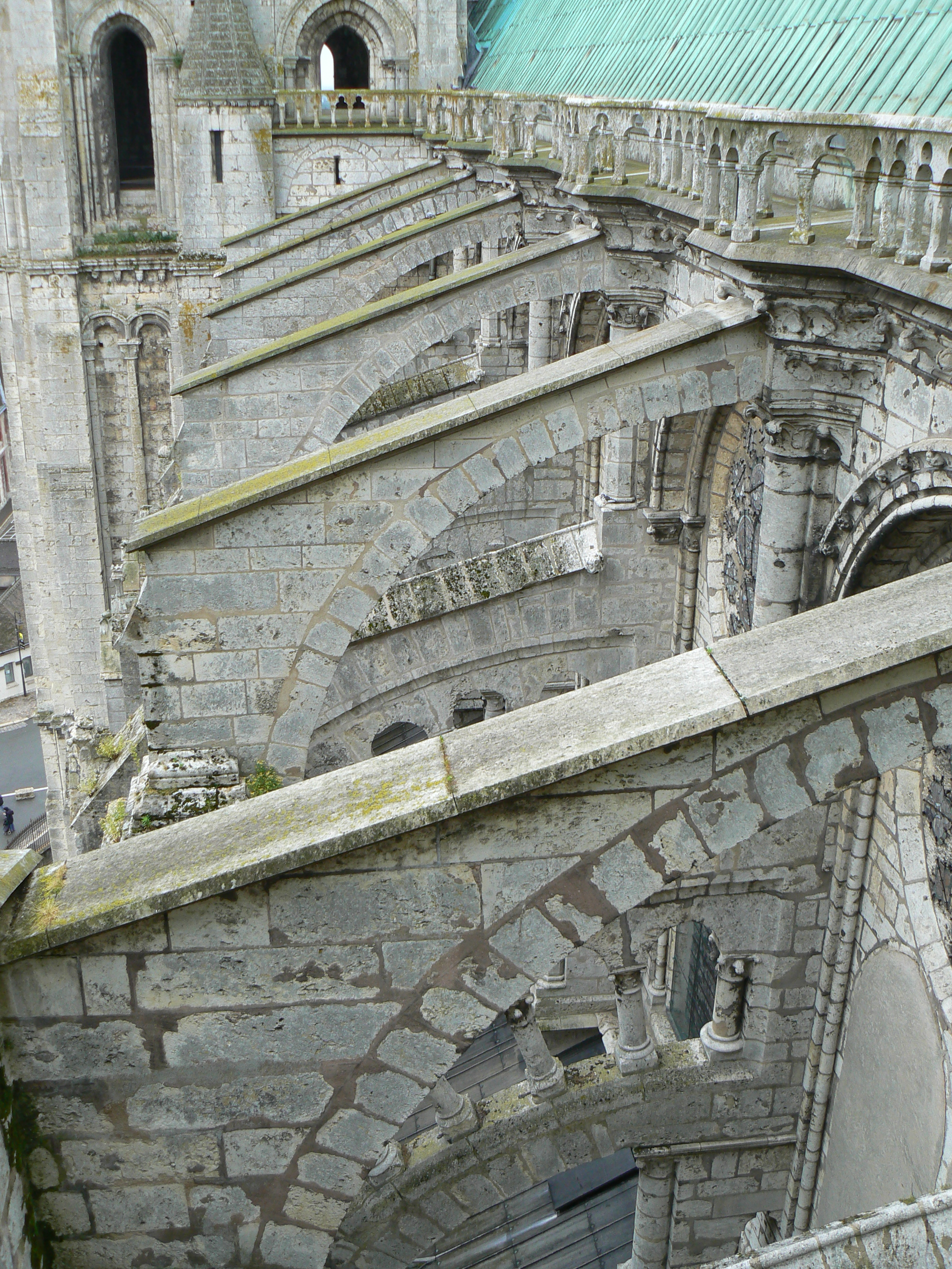 Vue des arcs-boutants de la cathédrale de Chartres depuis le toit.